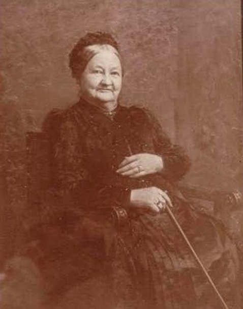 Franz Thöne. Porträt der Elise Custodis geb. Pose . Ölgemälde